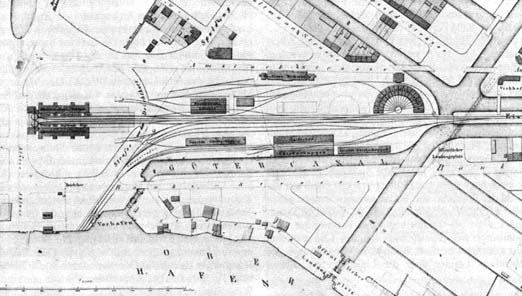 Gleisplan des Berliner Bahnhofes in Hamburg-Altstadt